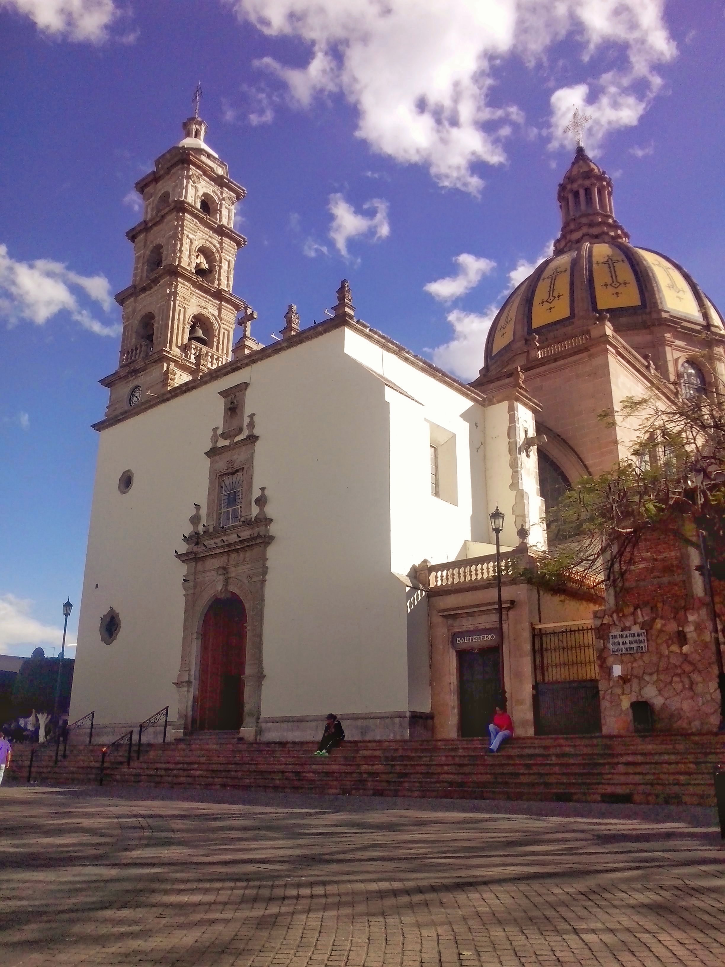 Capilla de El Señor de La Piedad